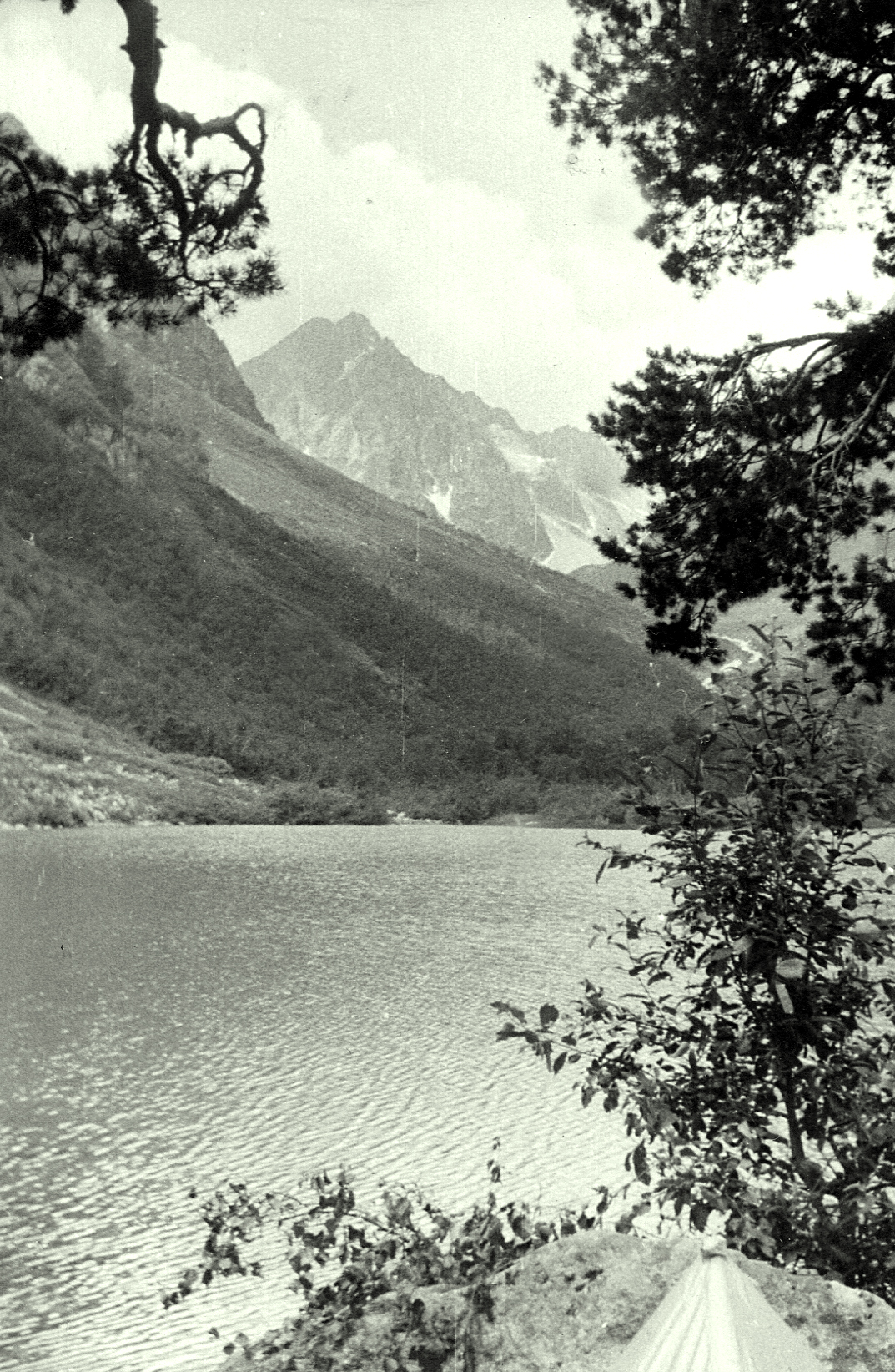 Северный Кавказ. Бадукское озеро.